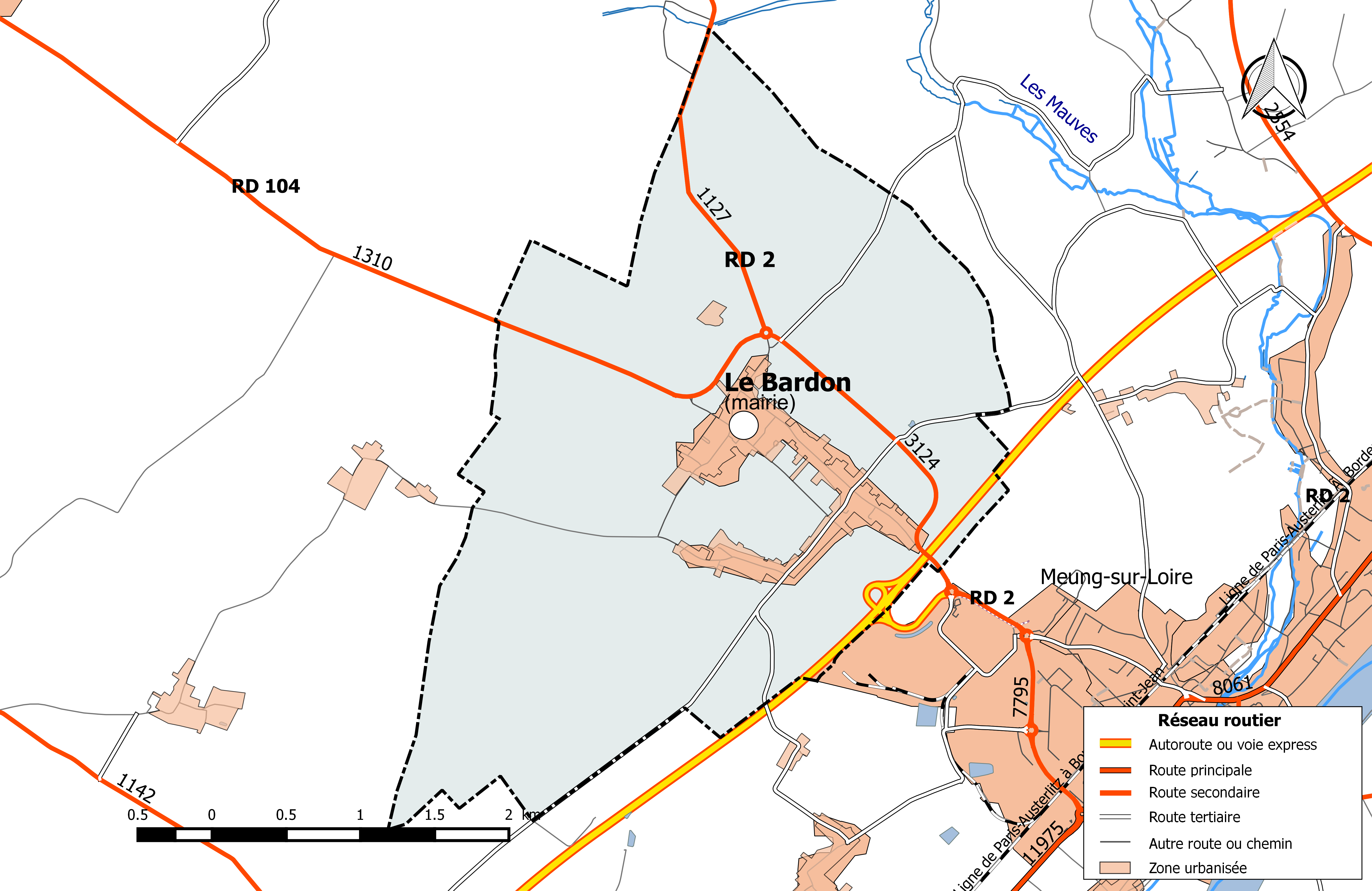 Carte du réseau routier de la commune de Le Bardon.